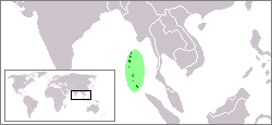 Locatie Andamanen - eigen bewerking van Thailandlocatie - origineel door nl::en:user:Vardion. GFDL